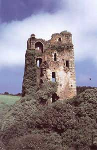 Donjon du château de Trémazan Photo propriété de l'Association SOS Chateau de Trémazan Pour plus d'info consulter